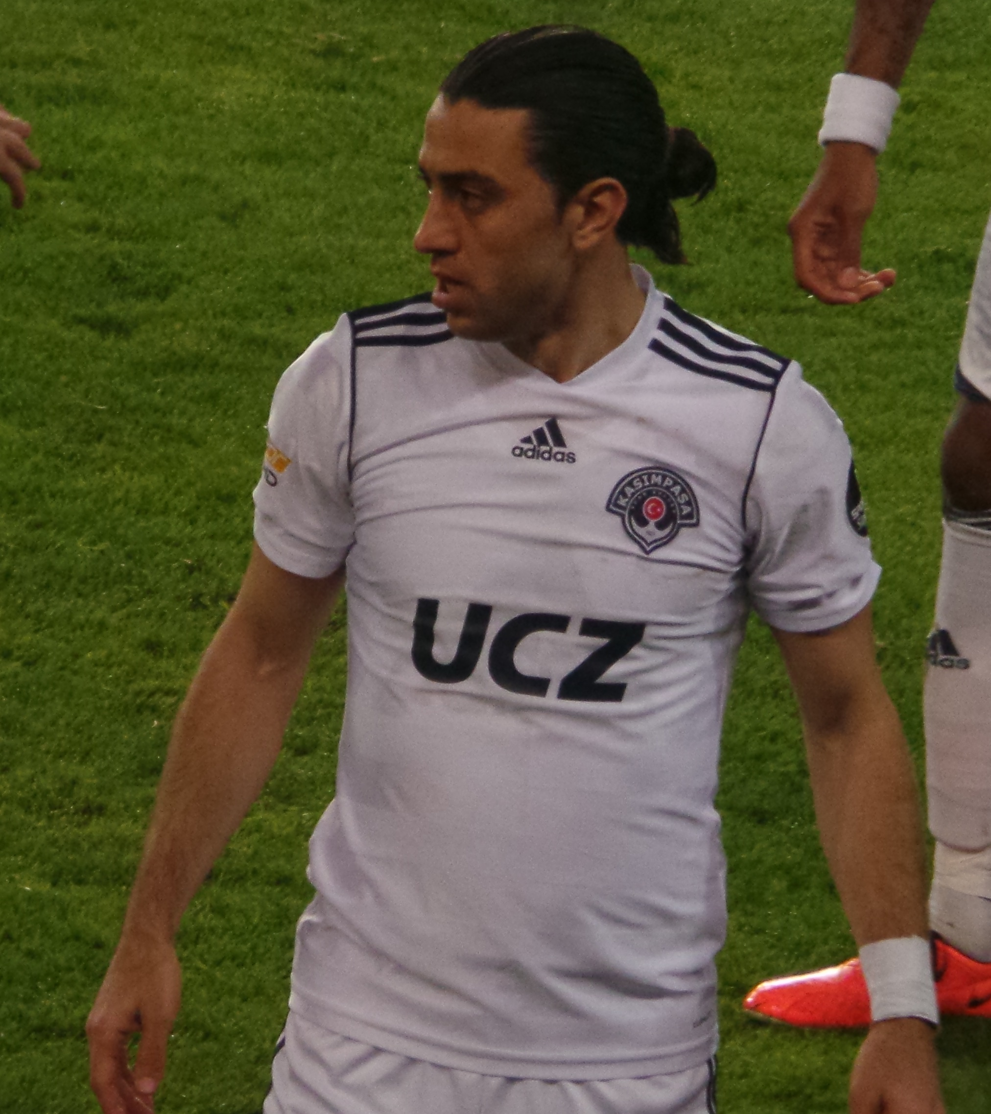 Sancak Kaplan